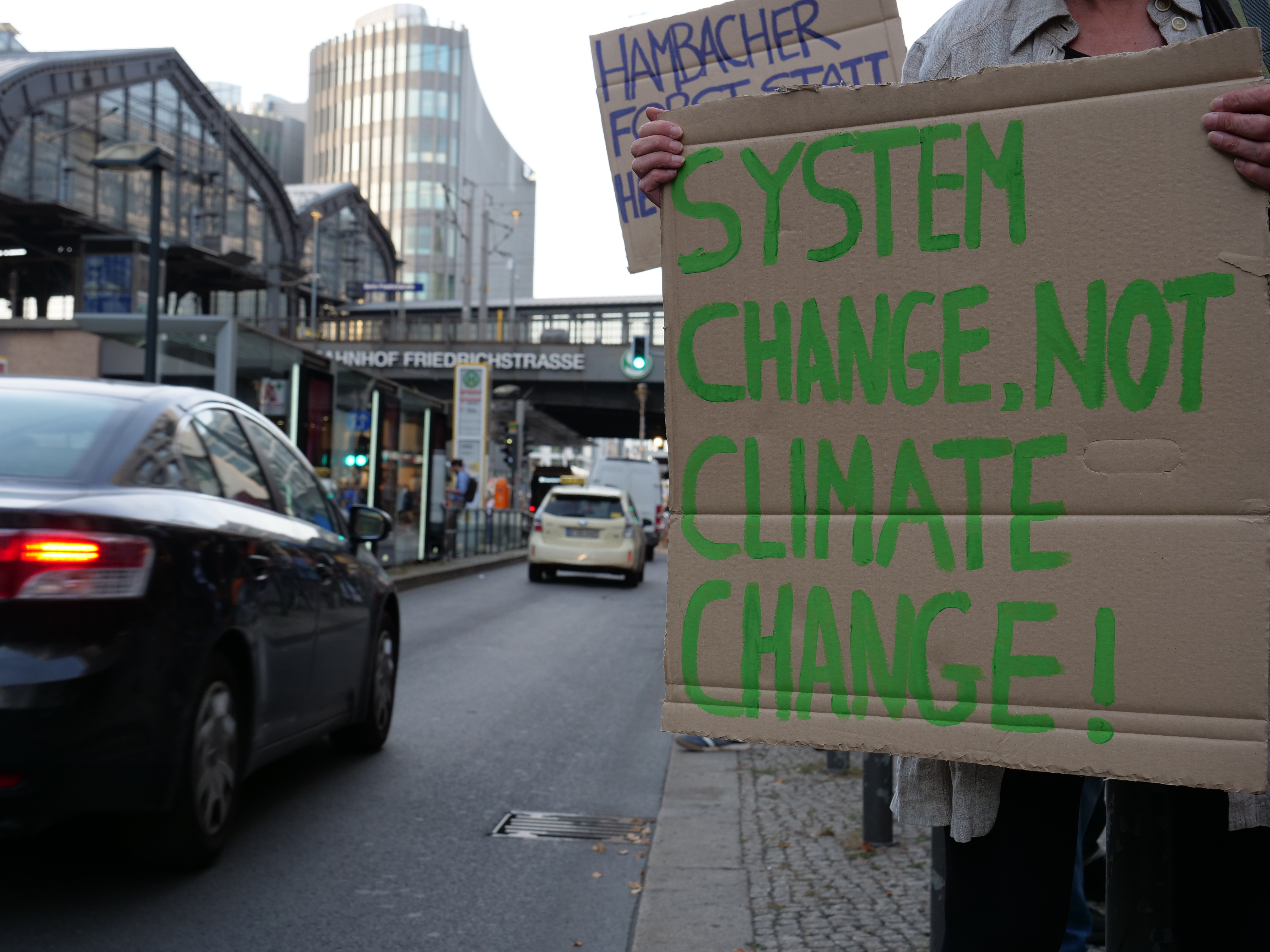 Solidaritätskundgebung mit der Besetzung im Hambacher Forst, gegen die Räumung der Baumhäuser, vor dem RWE Lobbybüro in der Friedrichstraße 95 in Berlin-Mitte.